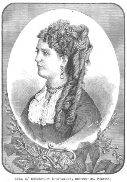 Concepción Estevarena, distinguida poetisa